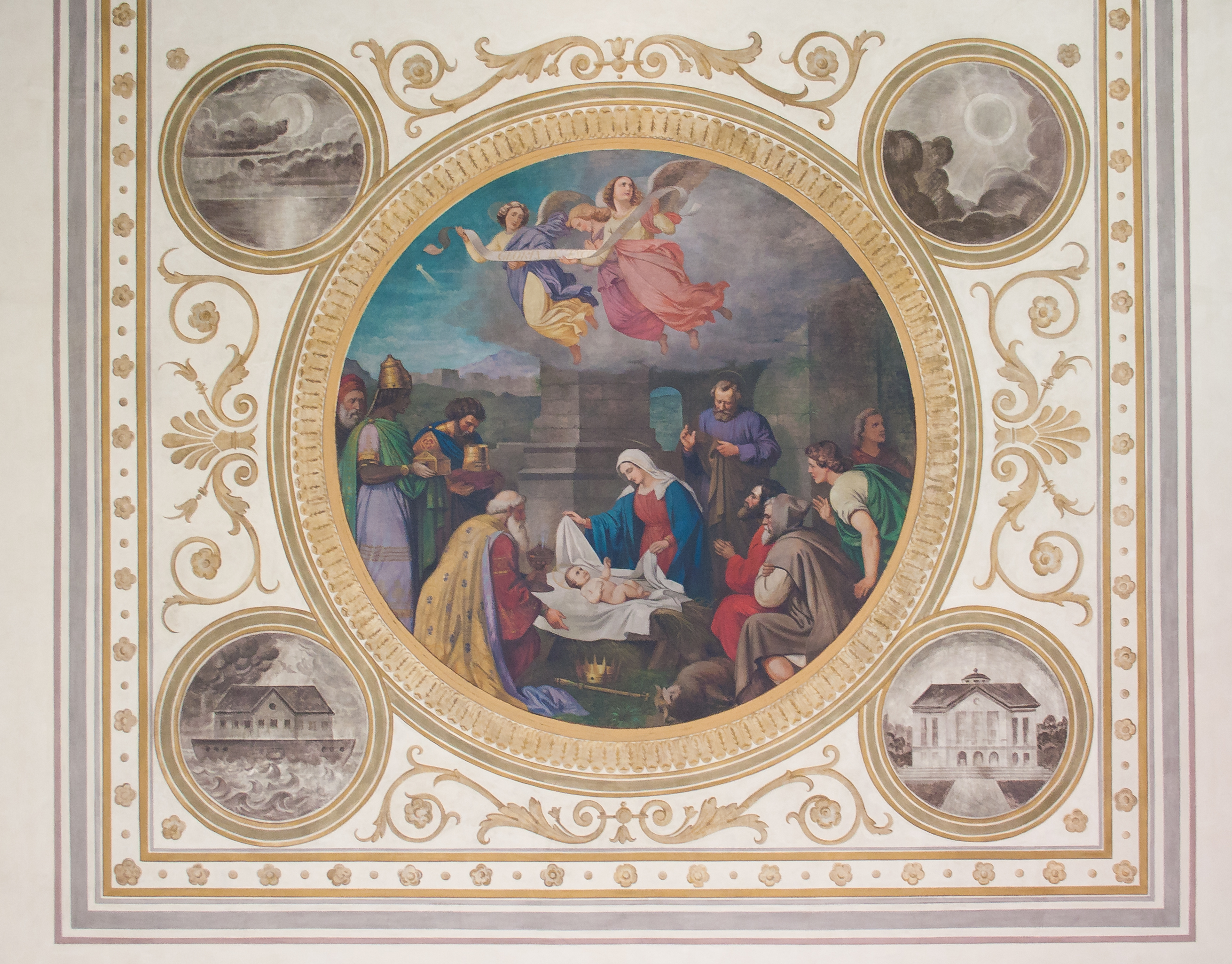 Kath. Pfarrkirche Unsere Liebe Frau, Fürth, Bavaria, Germany